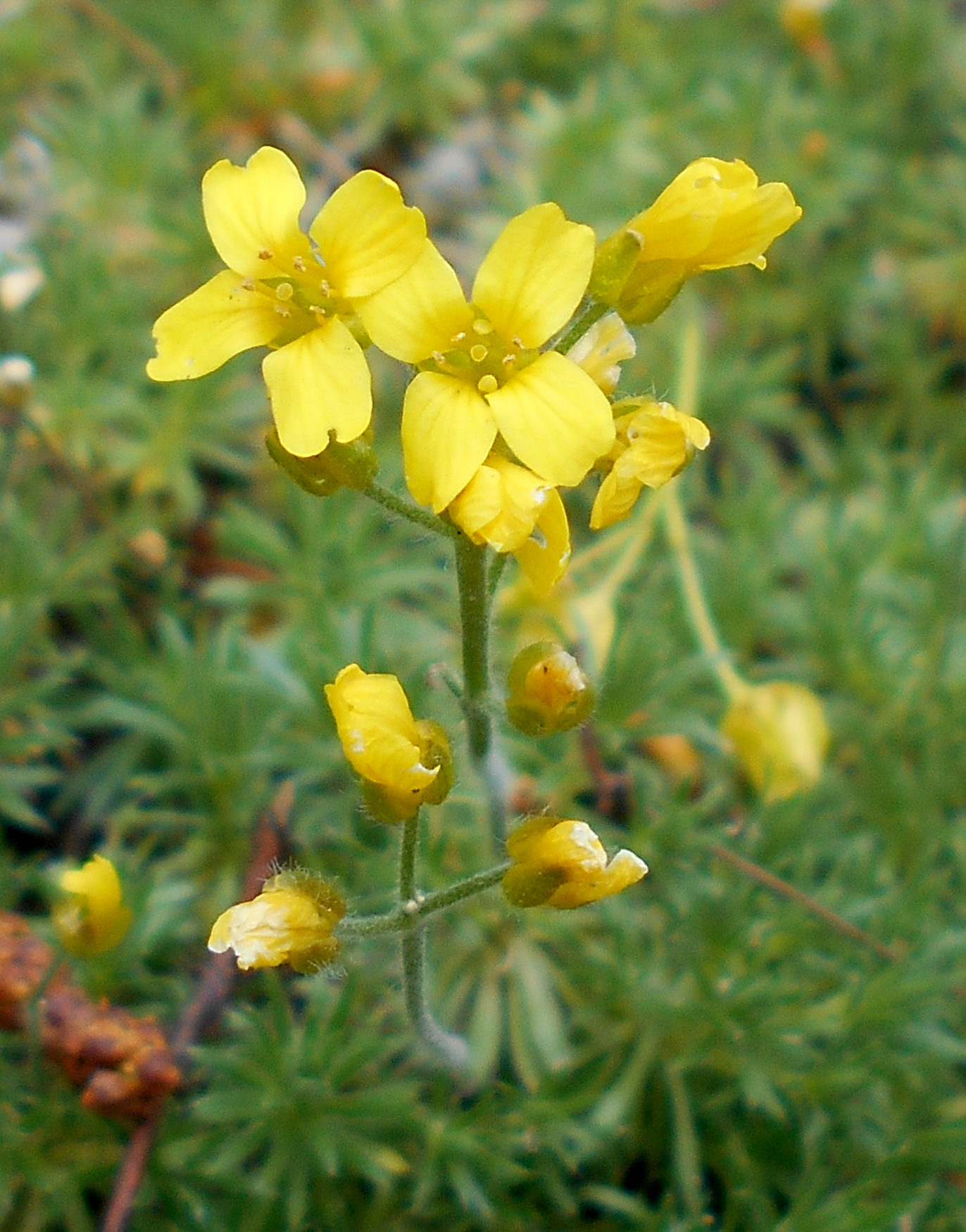 Głodek wełnistoowockowy (Draba lasiocarpa), Ogród Botaniczny UMCS w Lublinie.